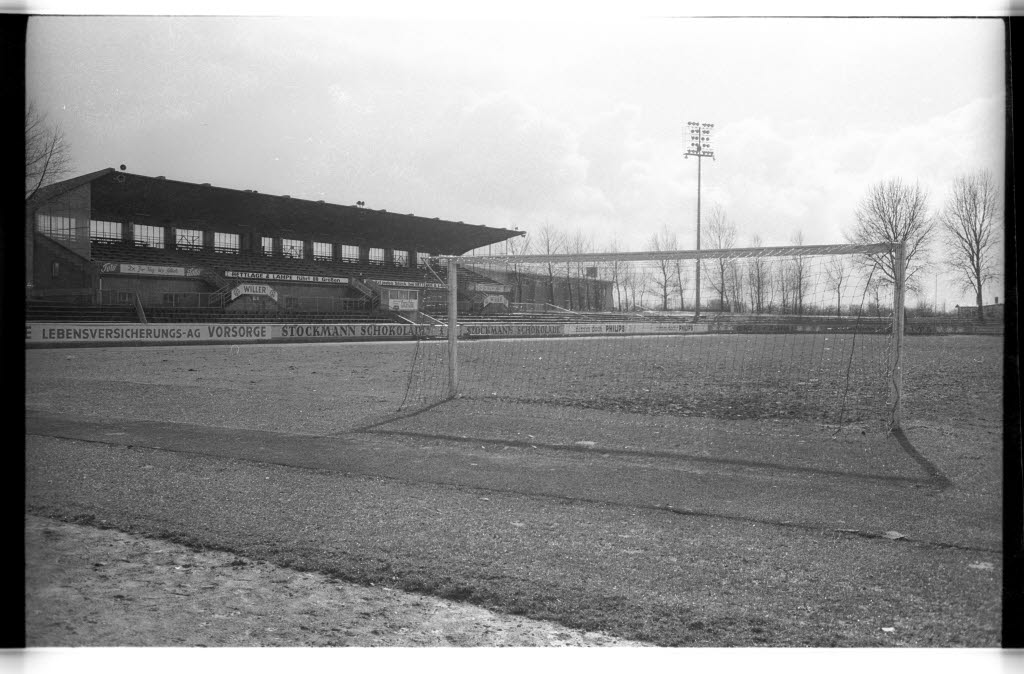 Holsteinstadion am Westring 501